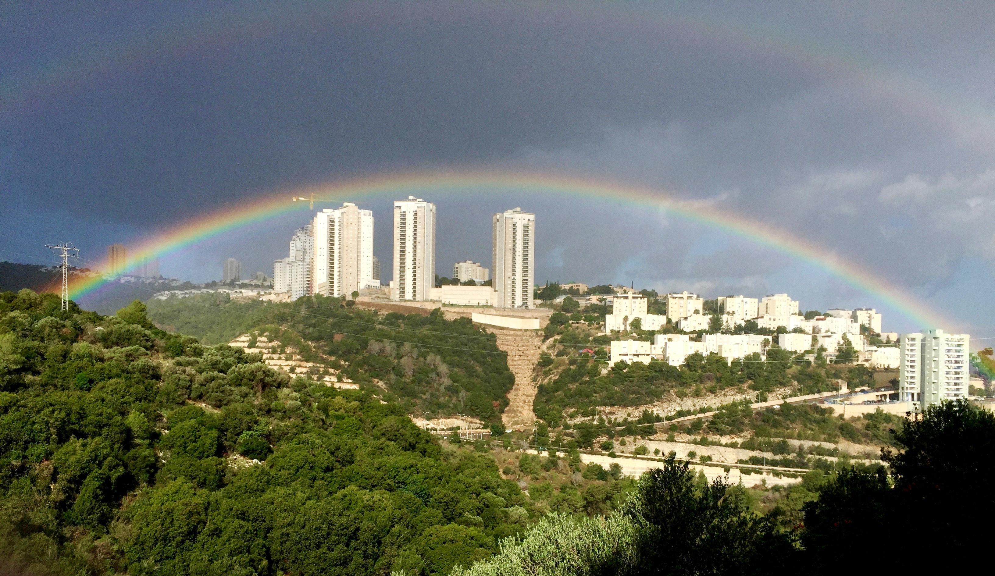 קשת בענן מעל שכונת רמות יצחק בעיר נשר. מתחת לשכונת רמות יצחק עובר כביש 705. התמונה צולמה משכונת גבעת נשר